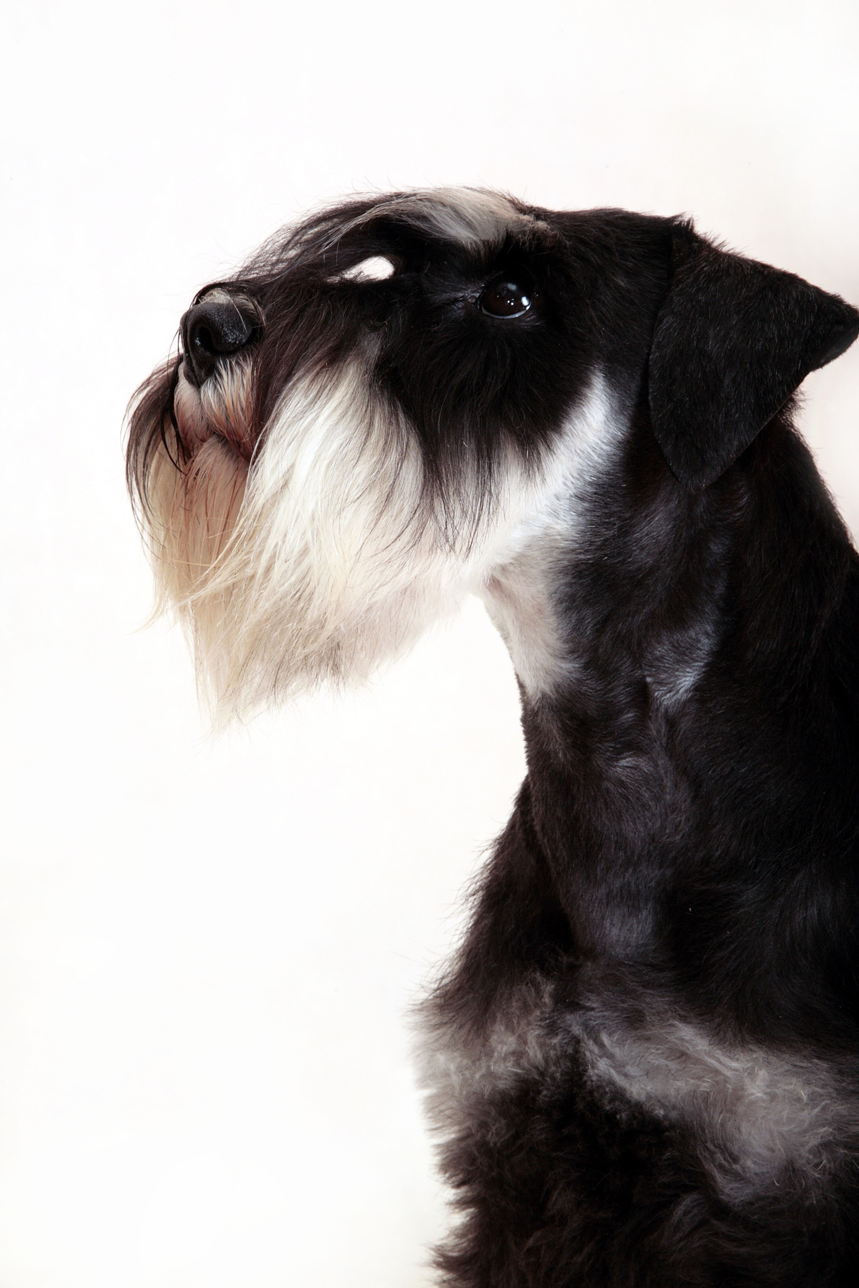 Питомник "Ассон Ари" Цвергшнауцеры белые и черные с серебром 21